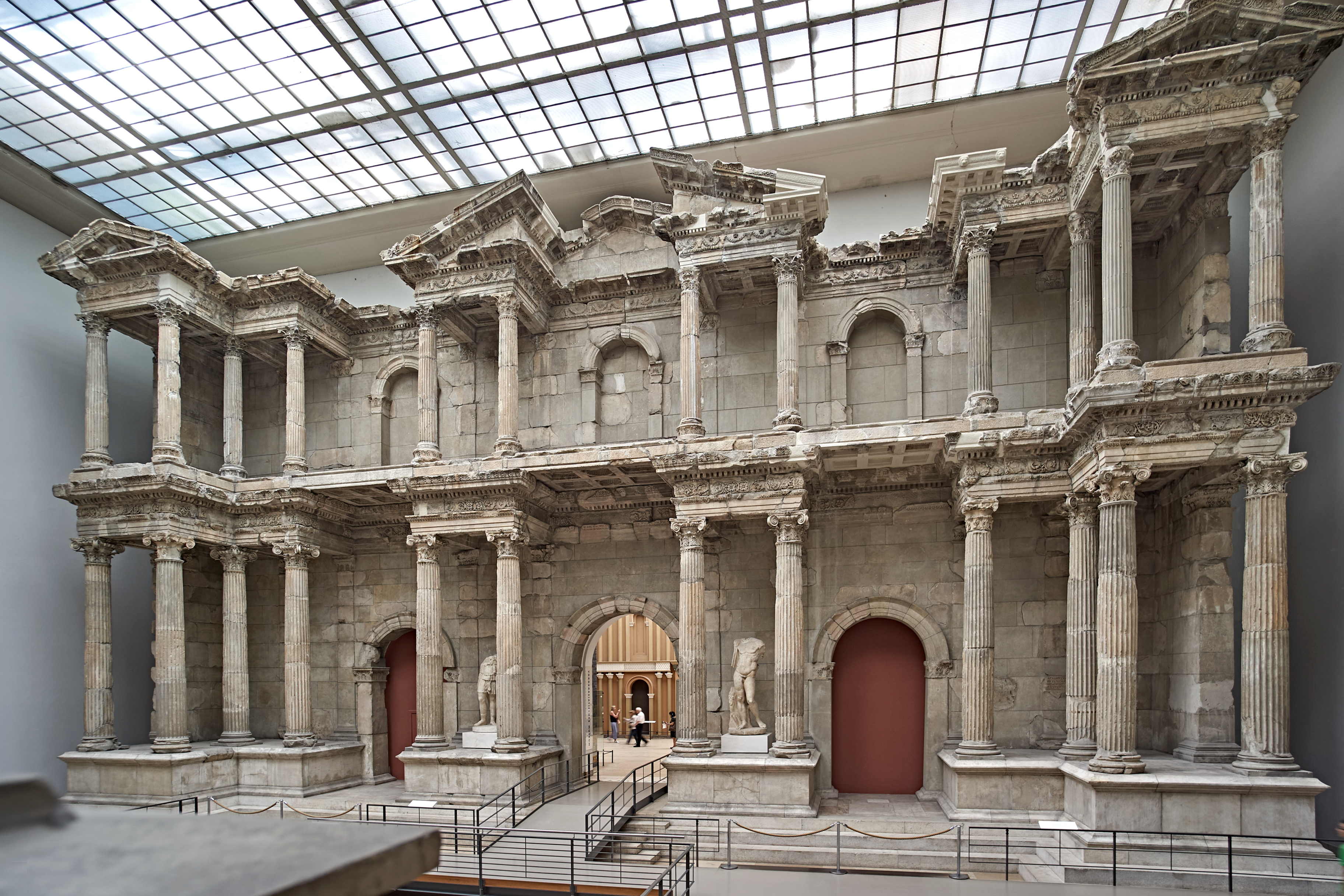 Gesamtansicht von dem Markttor zu Milet in dem Pergamonmuseum, Berlin